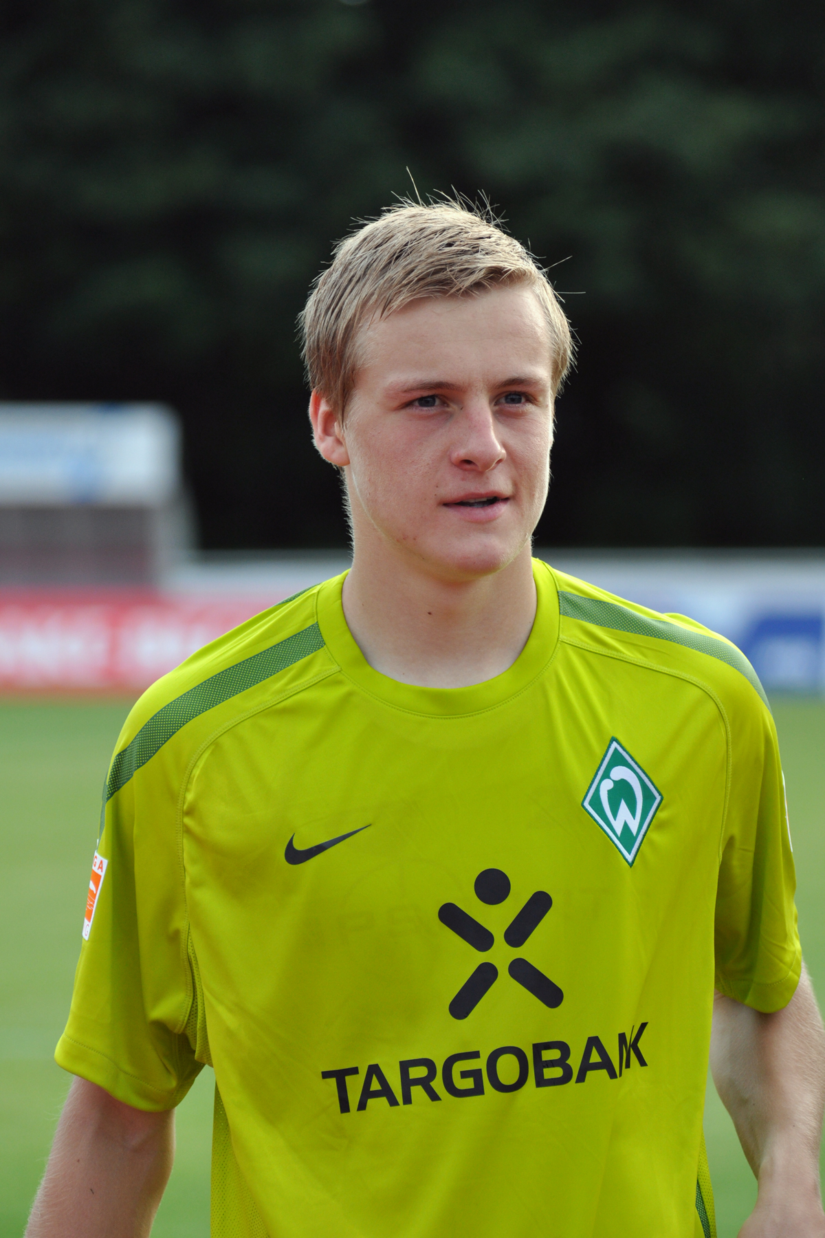 Felix Kroos